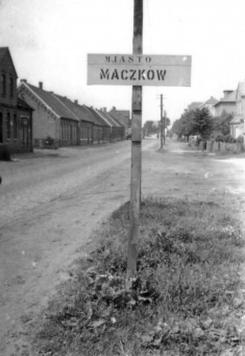 Powojenny Maczków